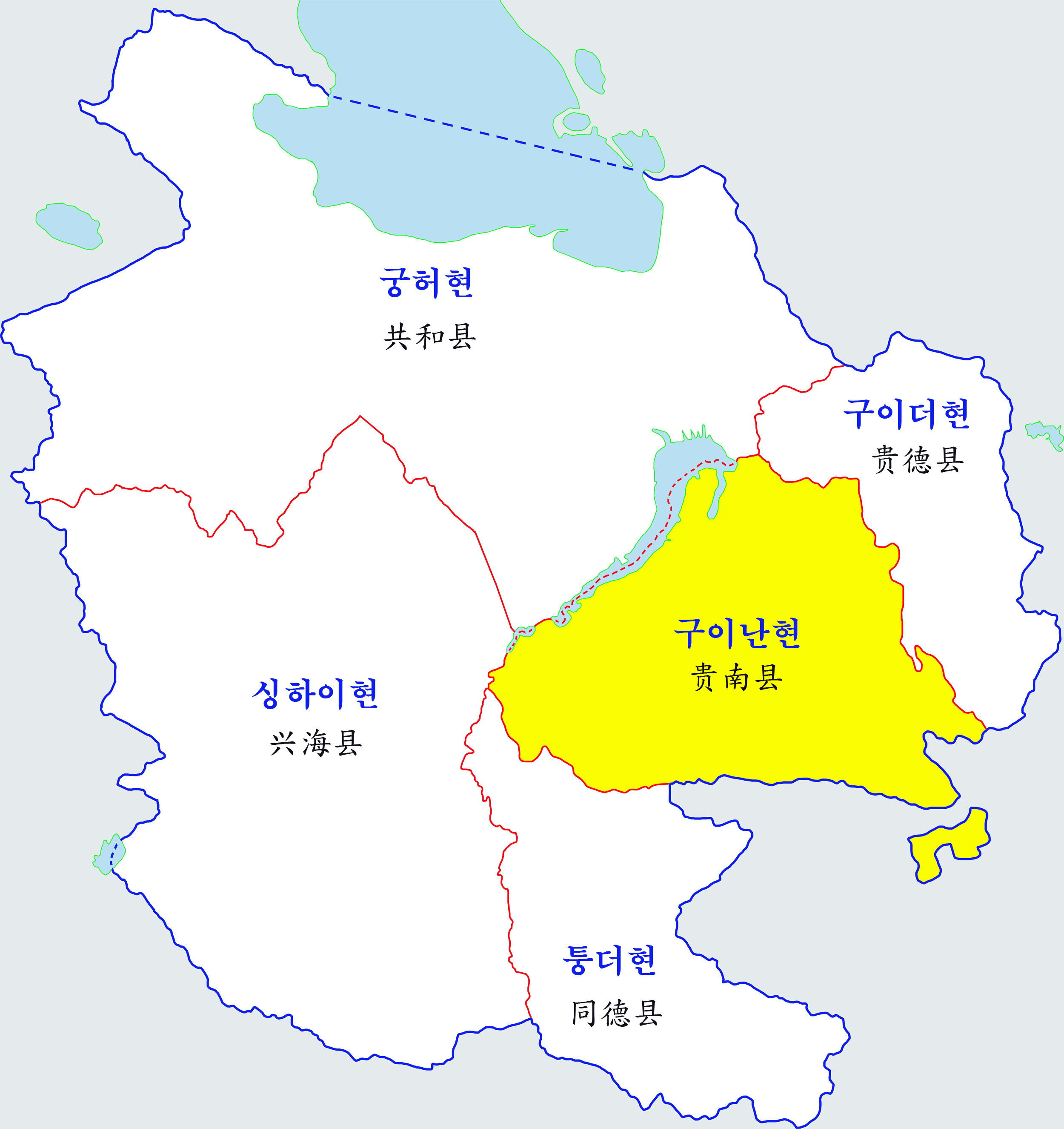 하이난티베트족자치주지도